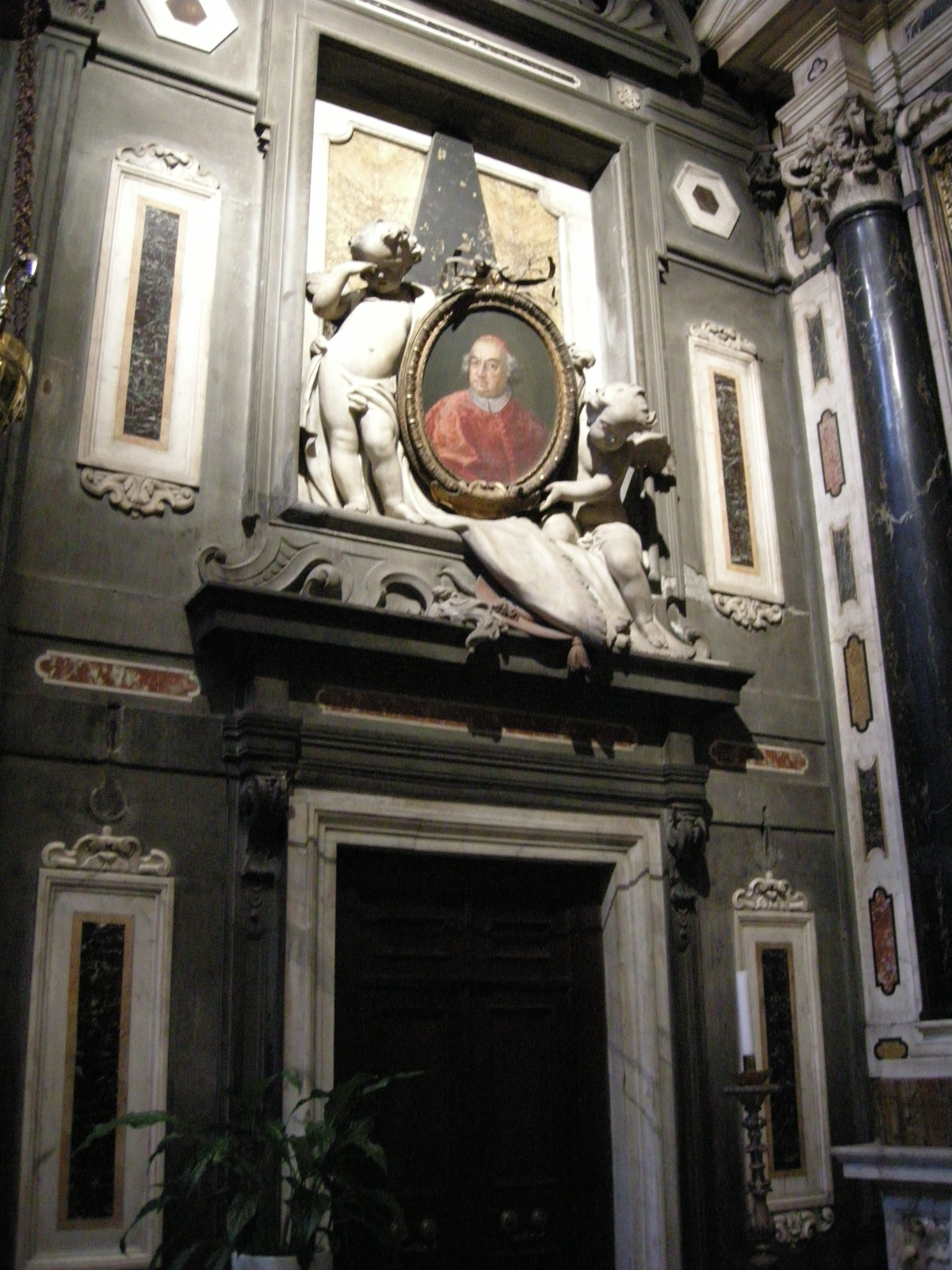 Cappella Martelli nella chiesa dei santi Michele e Gaetano a Firenze - Ritratto a mosaico dalla tomba del cardinale Francesco Martelli.